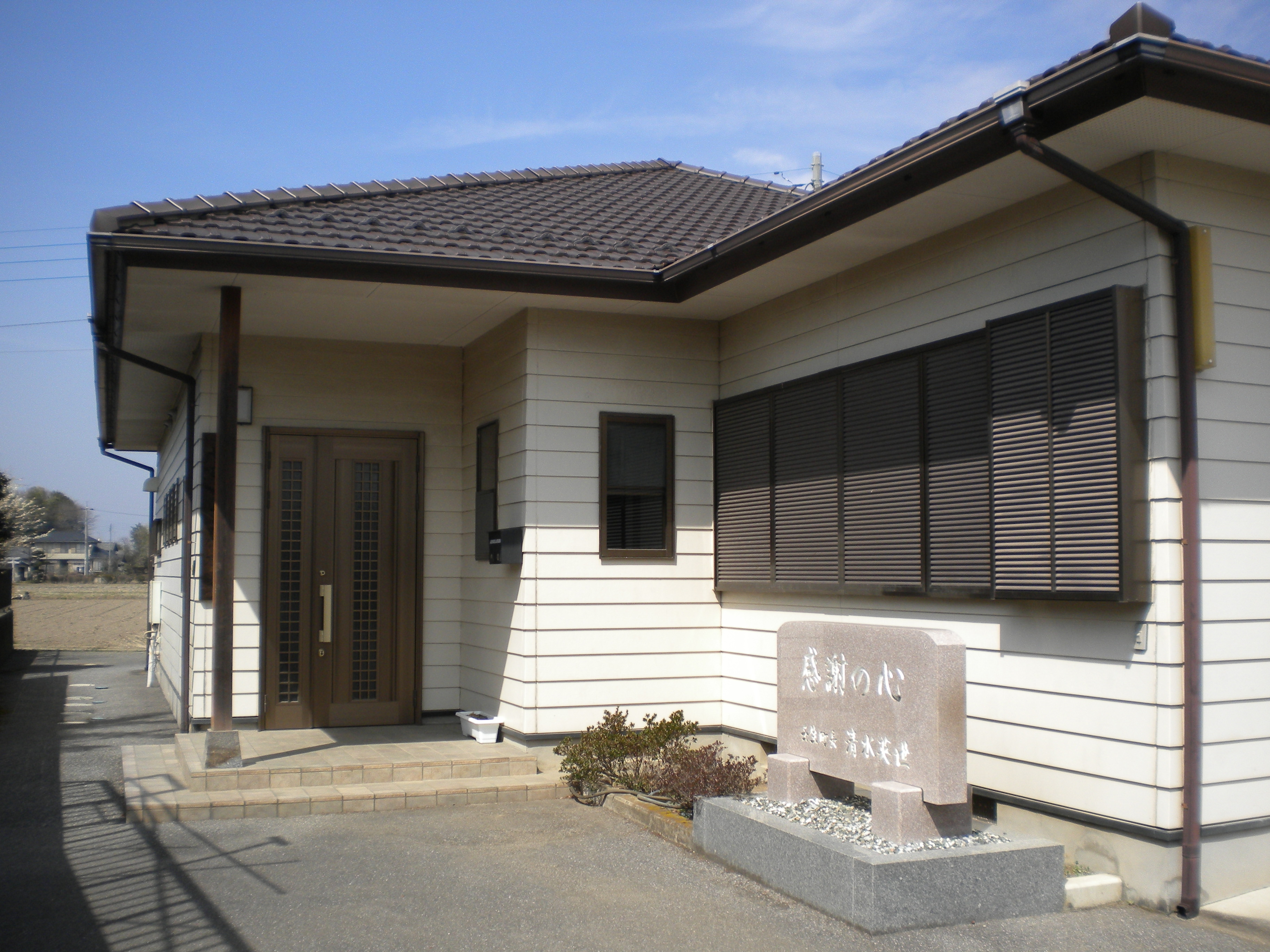 栃木県下都賀郡壬生町七ツ石 七ツ石ふるさと伝承館